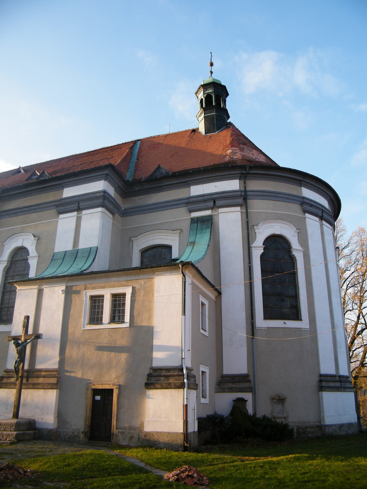 Kostel svatého Václava ve Šluknově